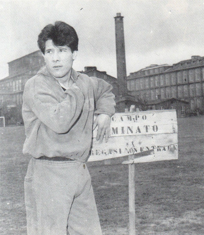 Torino. Il calciatore italo-argentino Omar Sívori alla Juventus, in una pausa di allenamento al Campo Combi.